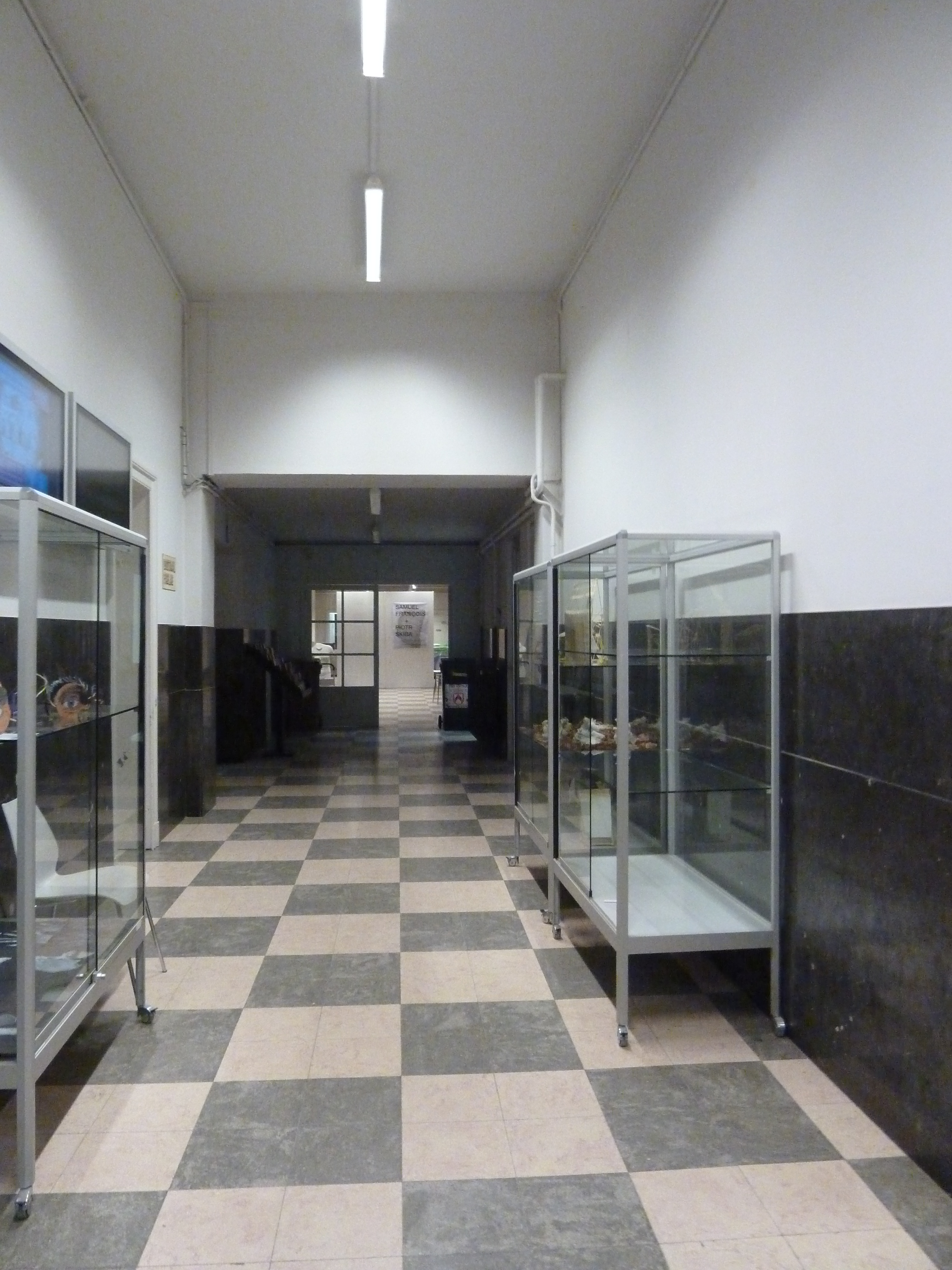 Inkom KASK Kortrijk